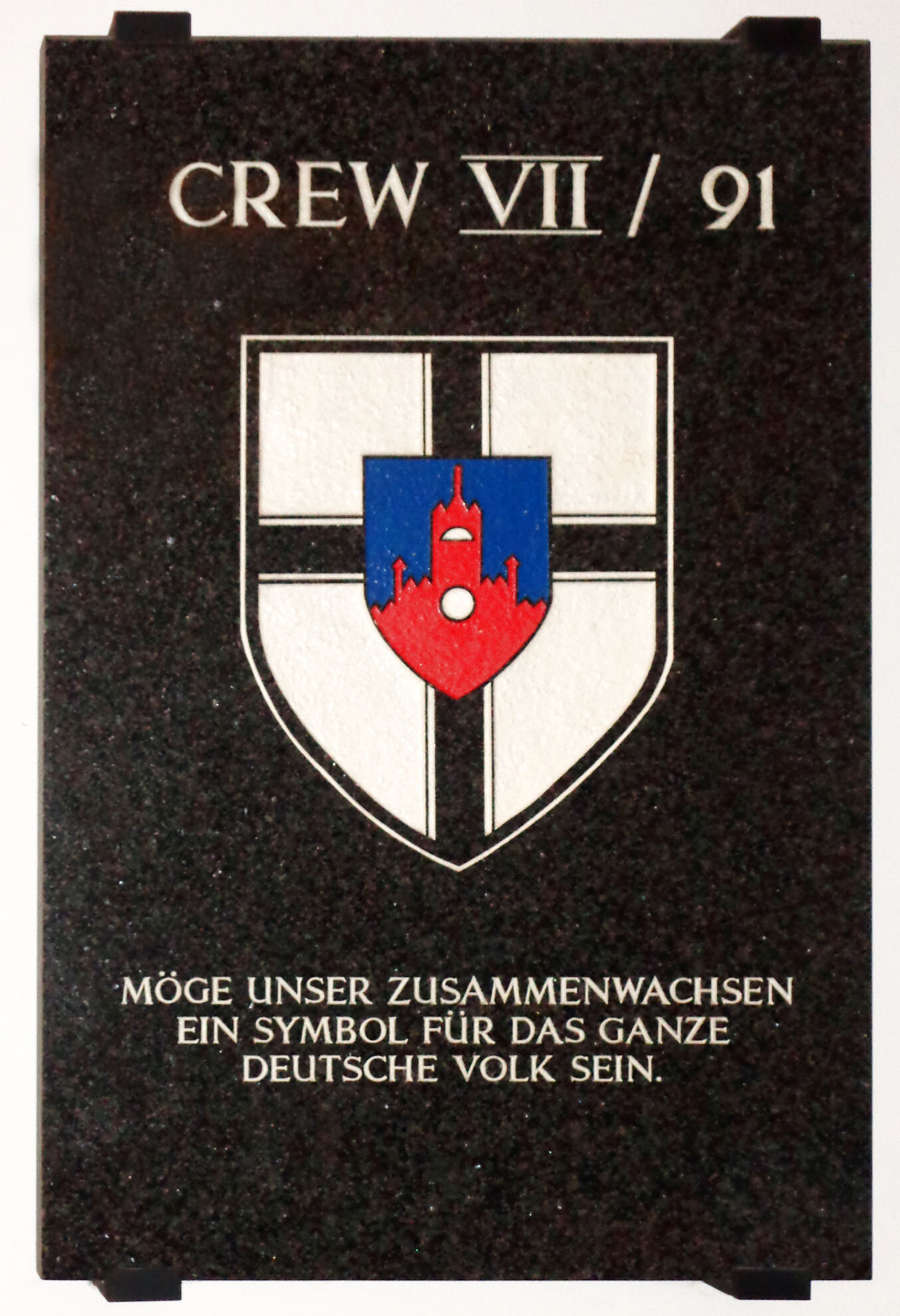 Marmortafel der Crew VII/91 im Treppenhaus der Marineschule Mürwik, Flensburg. Die Crew war der erste Jahrgang mit Offizieranwärtern aus den Neuen Ländern.